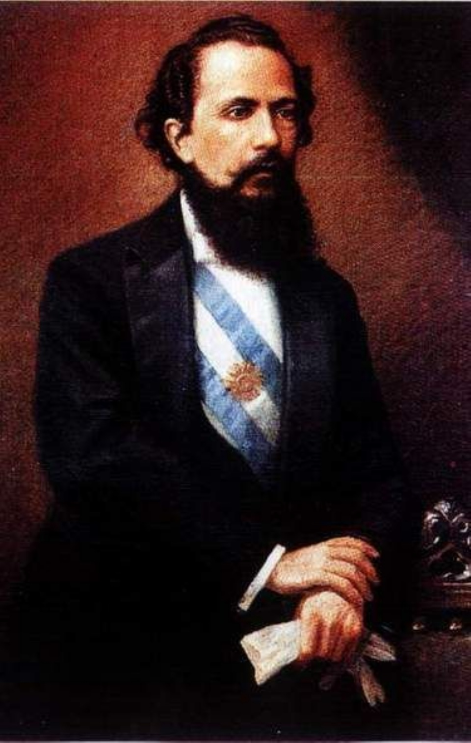 el presidente de la Nacion Argentina Nicolas Avellaneda